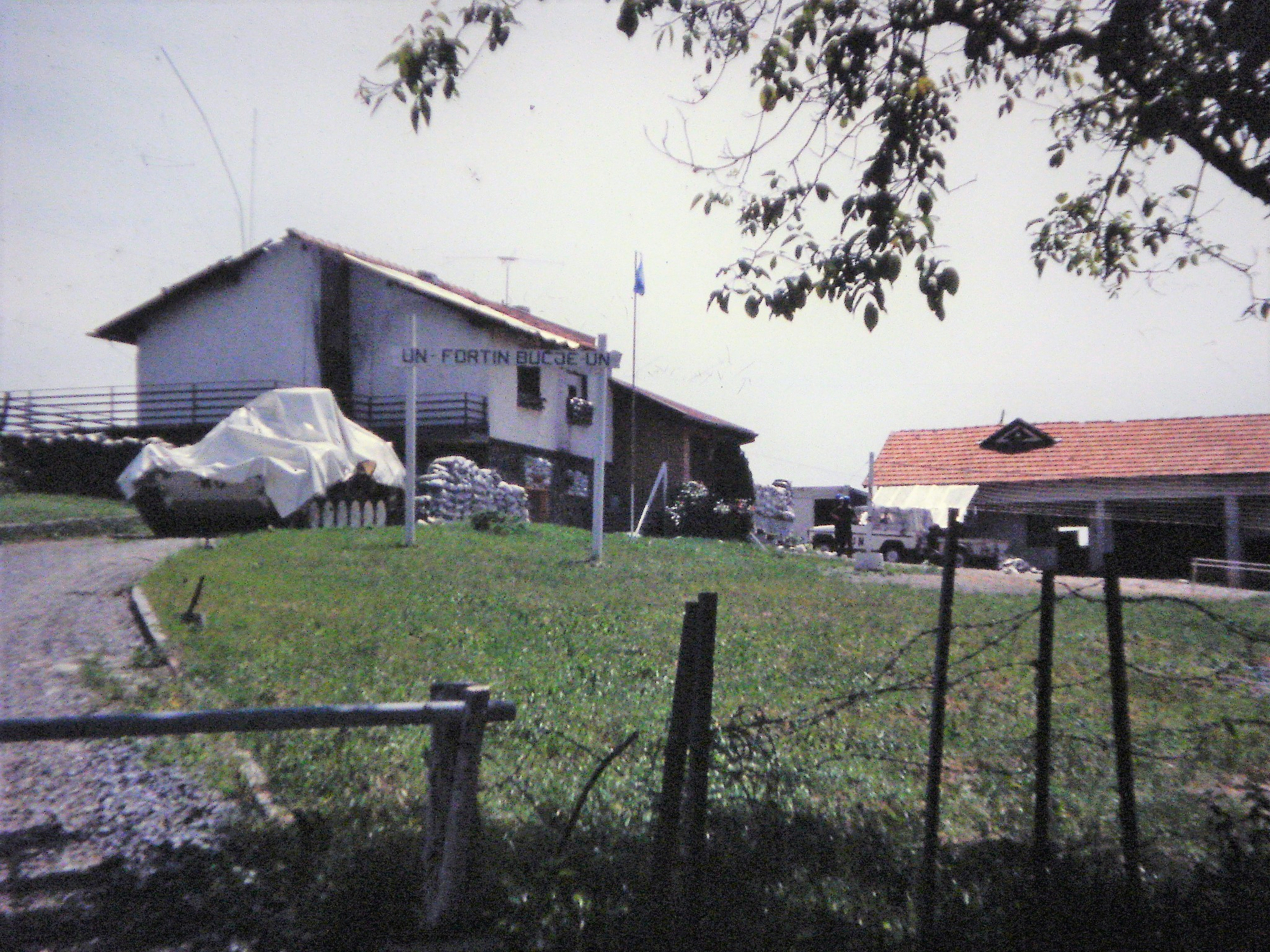 Base de UNPROFOR Bucje. Mediados de 1994.